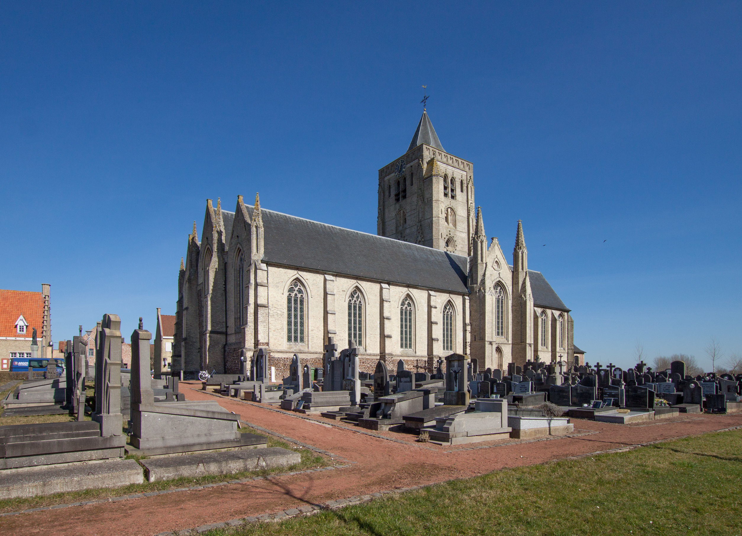 Beveren-IJzer Churchyard